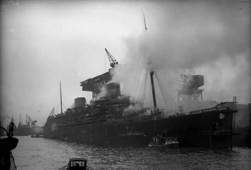 Der Riesenbrand des Ozeandampfers "Europa" in Hamburg! Der brennende Ozeanriese "Europa" auf der Werft Blohm & Voss im Hamburger Hafen.